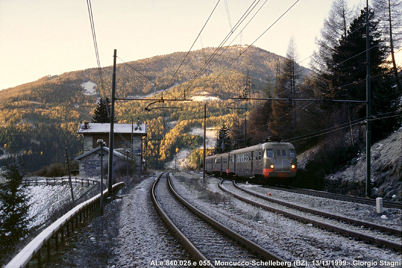 Stazione ferroviaria di Moncucco, nel territorio comunale di Brennero; è in sosta un treno formato dalle automotrici ALe 840.025 e 055 inquadranti una rimorchiata.